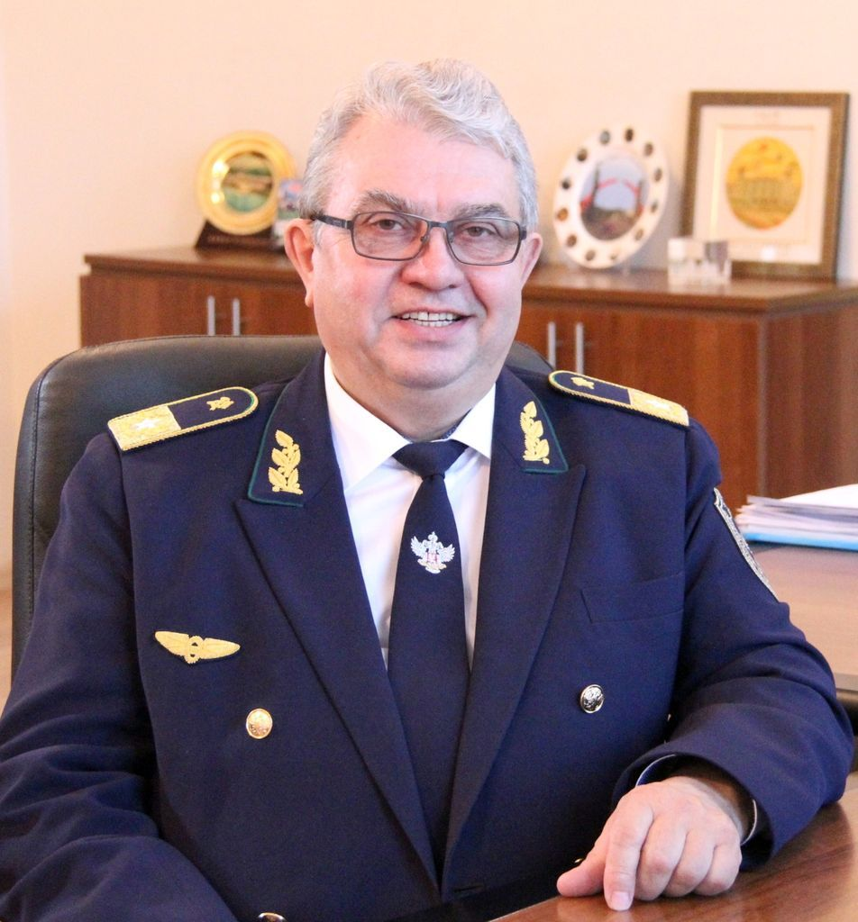 Ректор ДВГУПС